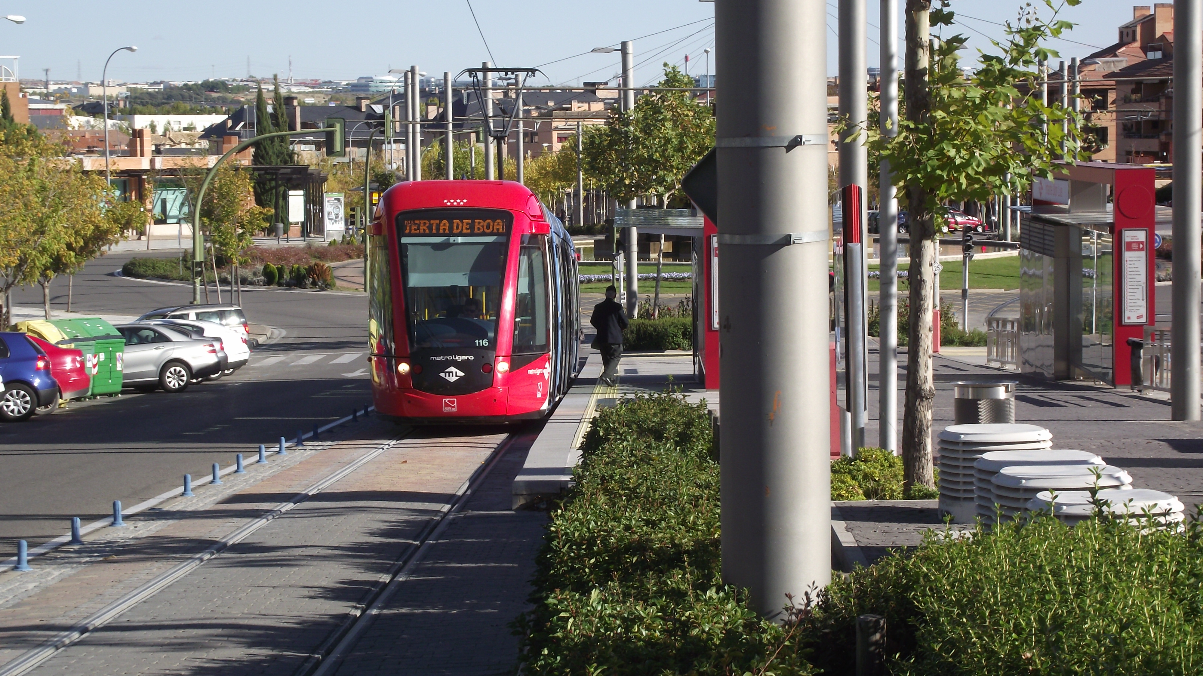 Tram bij de halte Infante Don Luis